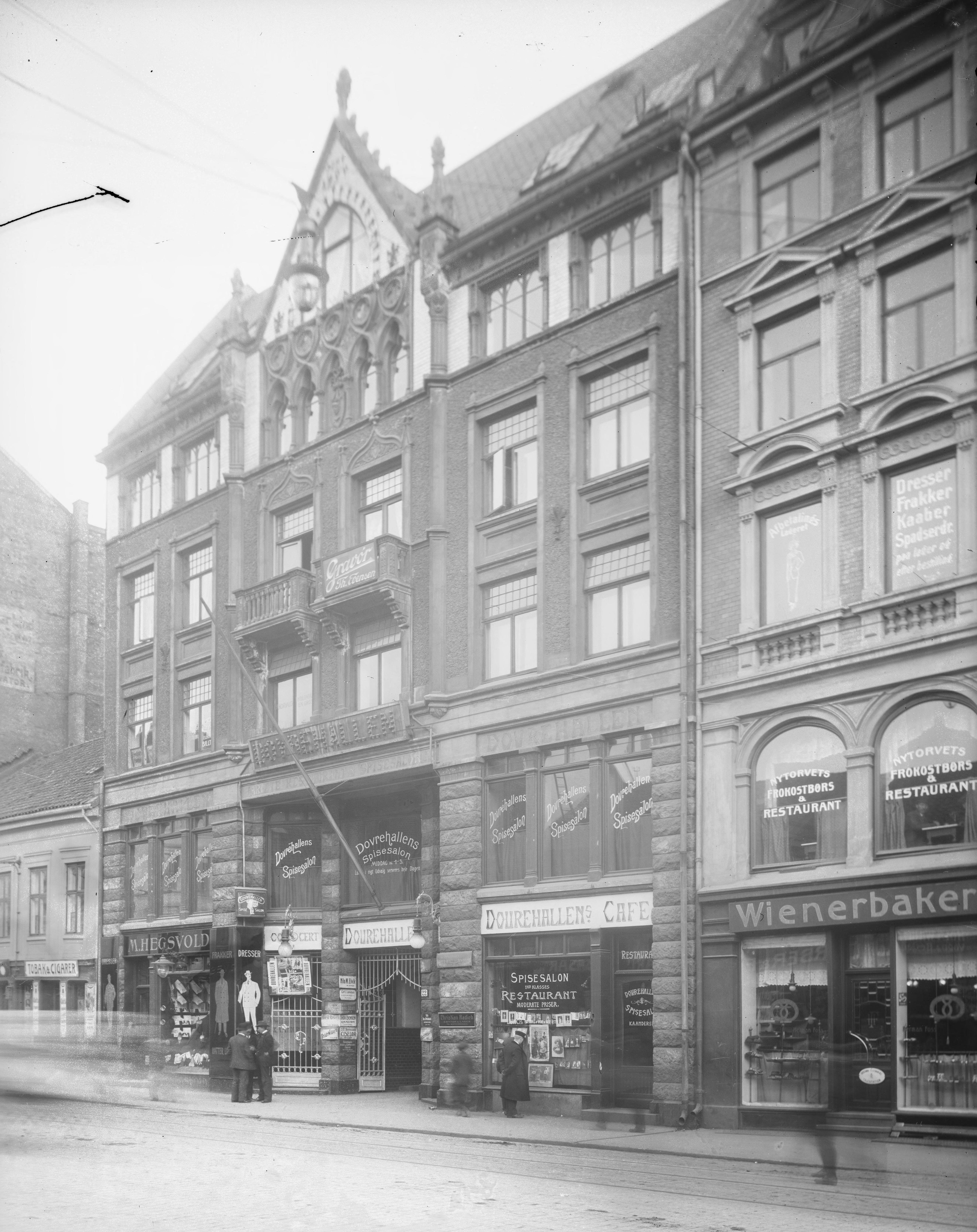 Bildet er hentet fra Nasjonalbibliotekets bildesamling. Anmerkninger til bildet var: Påskrift arkivark: Dovrehallen (Joh. M. Olsen) Eldste arkivnummer: 964 Yngre arkivnummer: 169 Oslo, Oslo